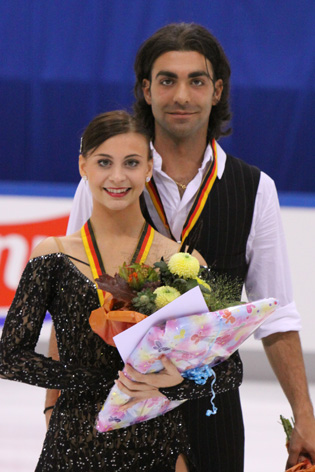 Lorenza Alessandrini and Simone Vaturi (RUS) at the 2009-2010 JGP Pokal der Blauen Schwerter.